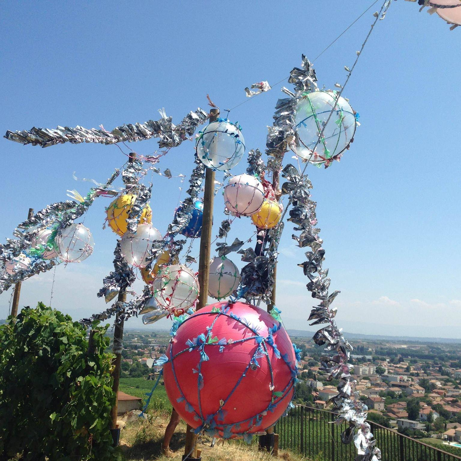 Travail autour du lien et de la tresse